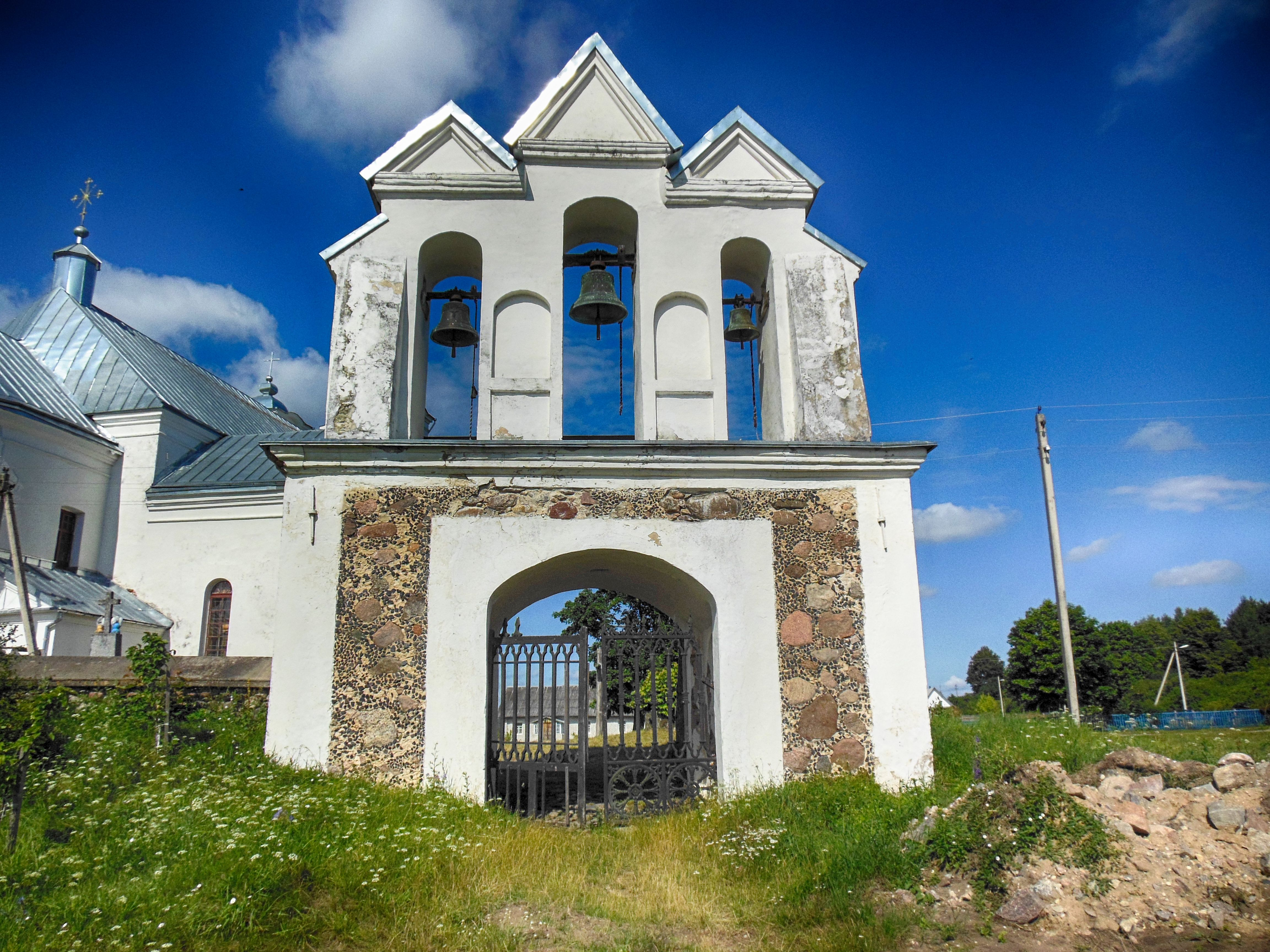 Беларуская (тарашкевіца): Касьцёл Марыі з брамай-званіцай і агароджай; дэкаратыўнае аздабленьне інтэр’еру касьцёлу — галоўны і два бакавыя алтары, дзьверы, лавы ў алтары. в. Вішнева This is a photo of Belarusian heritage monument. Reference number: 612Г000082 ( WLM)